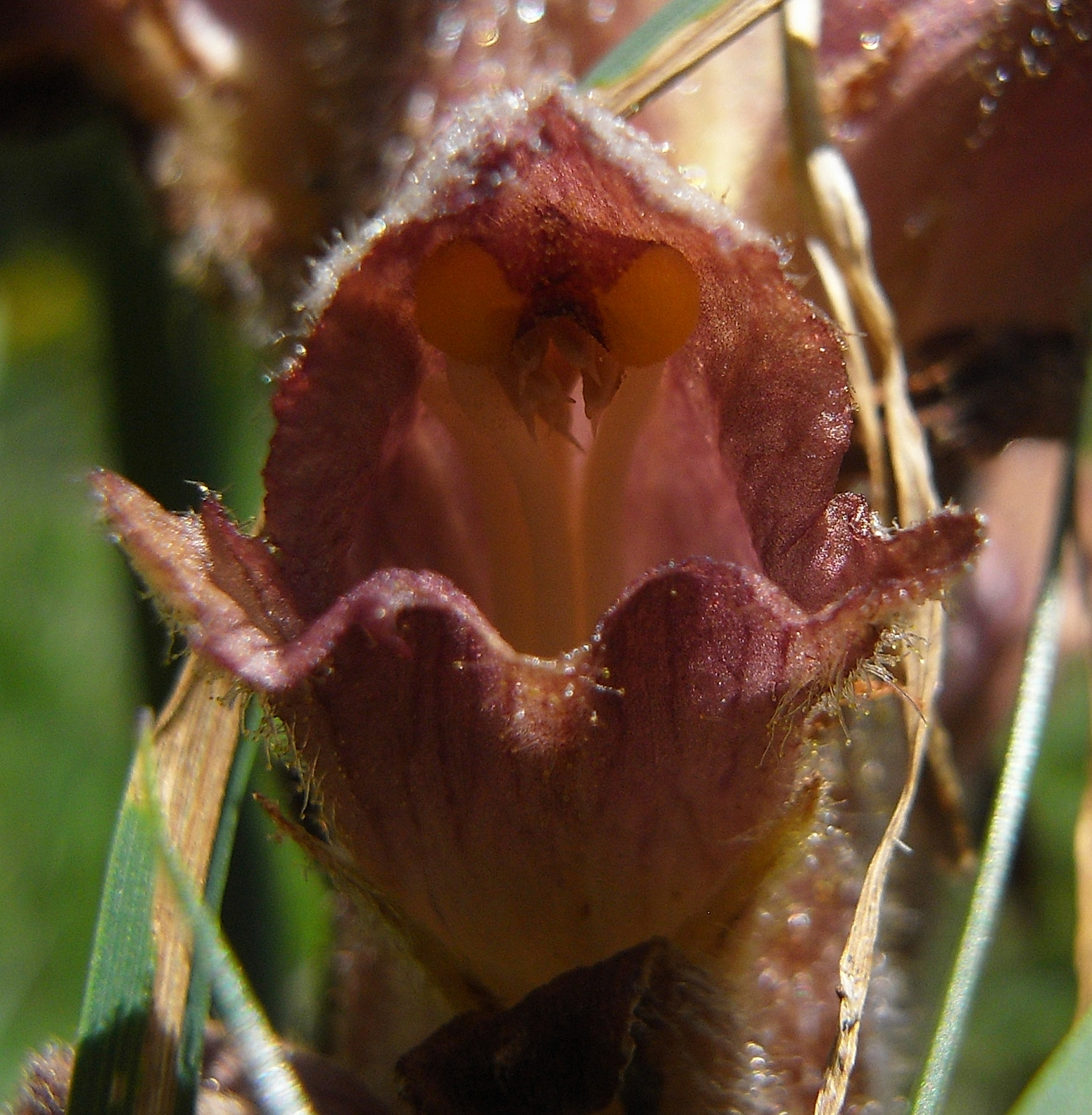 Einzelblüte der Ginster-Sommerwurz